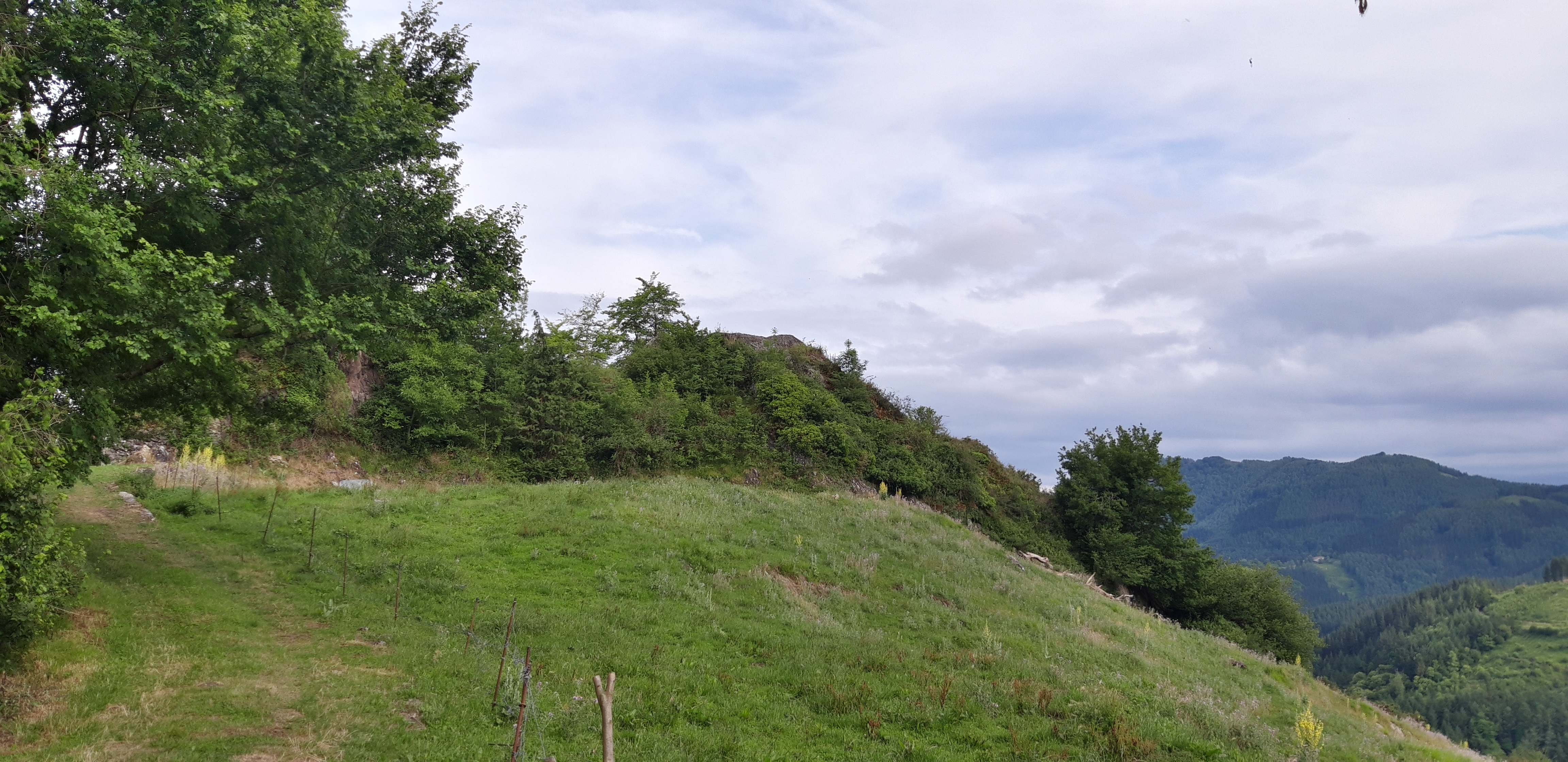 Iriaun edo Elosuako erdi aroko gazteluaren aztarnak, Aizpurutxo aranaren gainean.